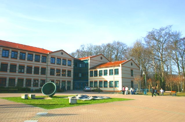 das Hauptgebäude der Hochschule Harz